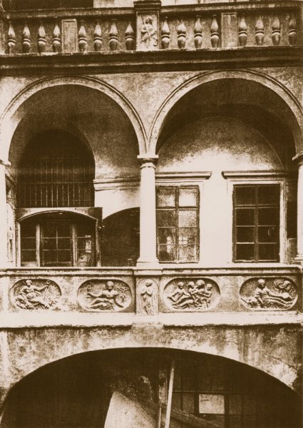 Arkáda ve dvoře renesančního Melantrichova domu čp. 471, zbořeného v r. 1893